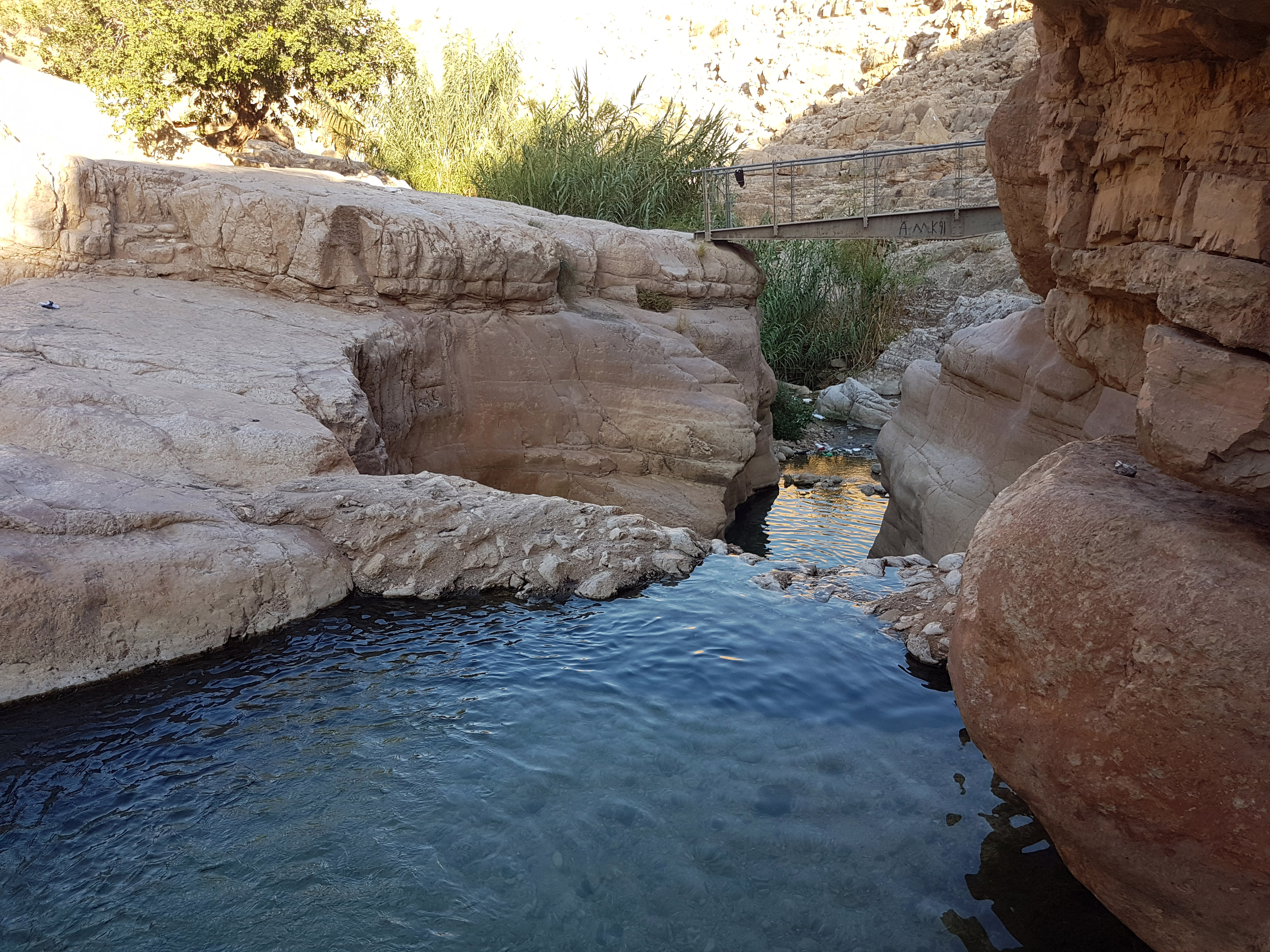 מעיין עין קלט